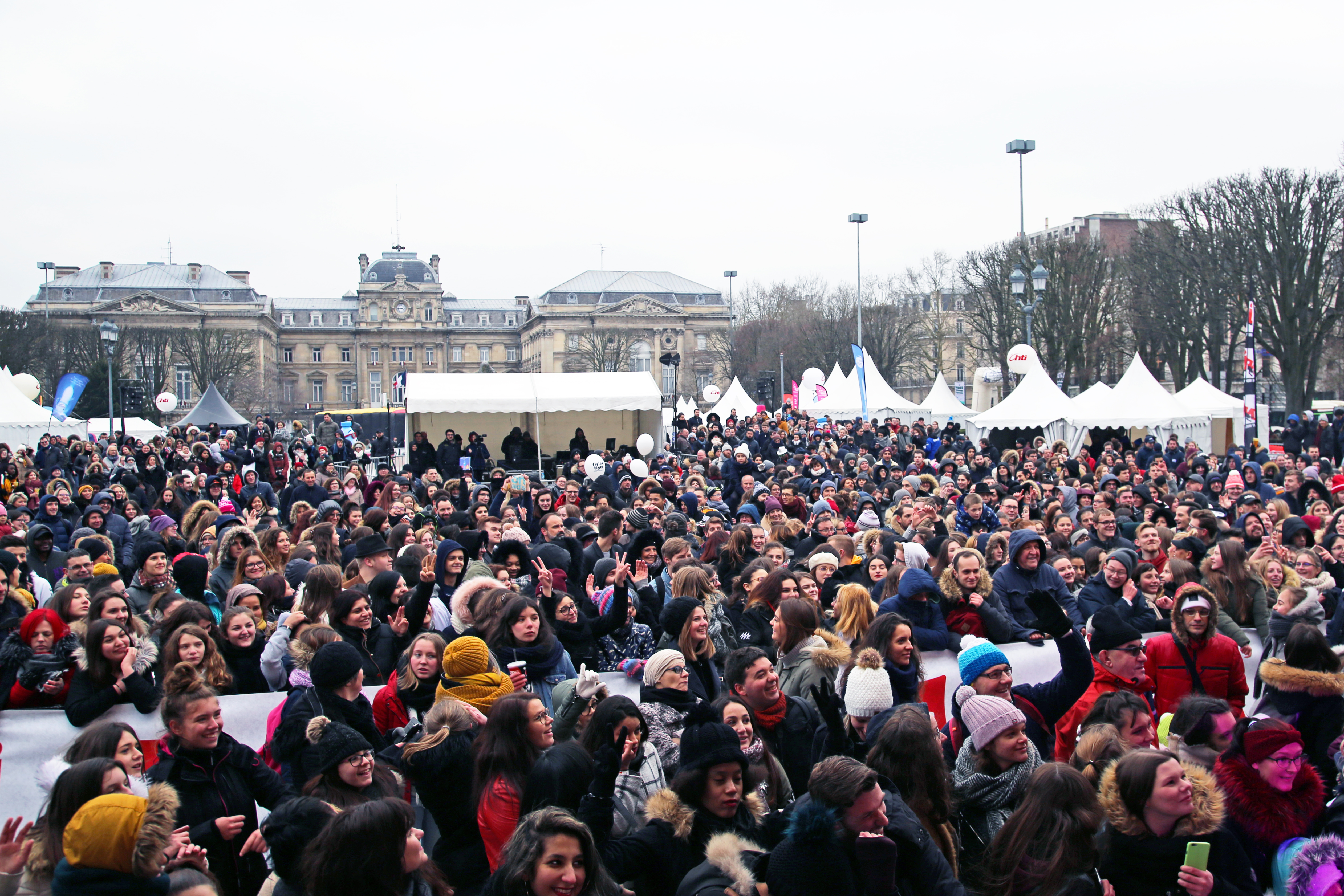 Concert organisé par Le Chti à l'occasion du lancement de la nouvelle édition du city-guide, le 17 mars 2018, Place de la République à Lille